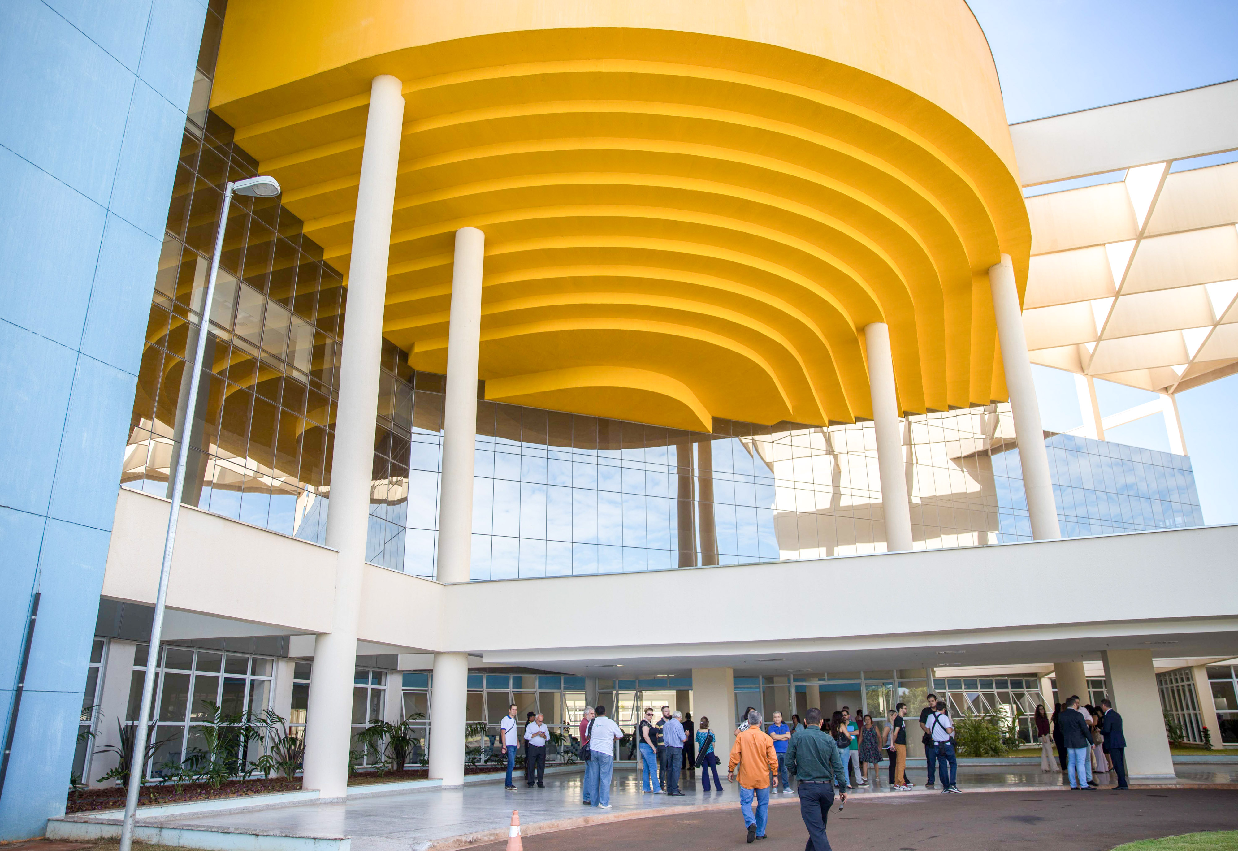 O Governador do Estado de São Paulo, Geraldo Alckmin, durante inauguração do Hospital Regional de Piracicaba. Local: Piracicaba/SP. Data: 16/03/2018 Foto: Governo do Estado de São Paulo